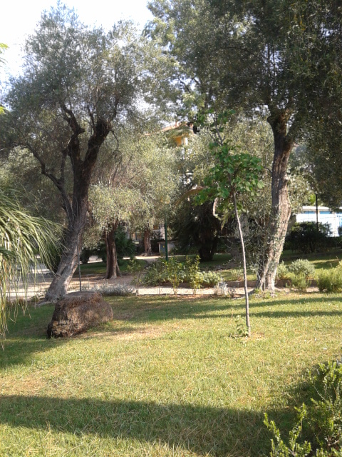 Jardins Lowe, intérieur